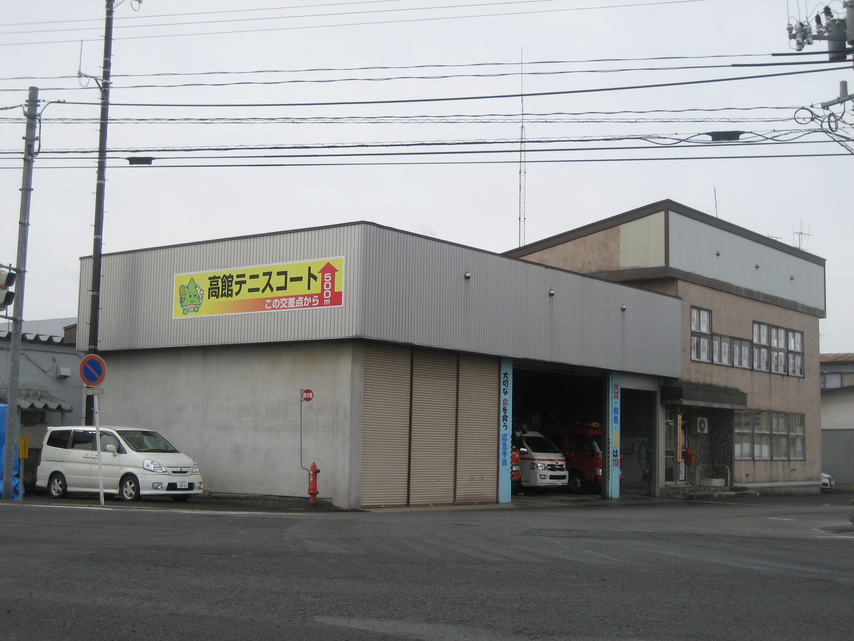 大館市消防署北分署庁舎